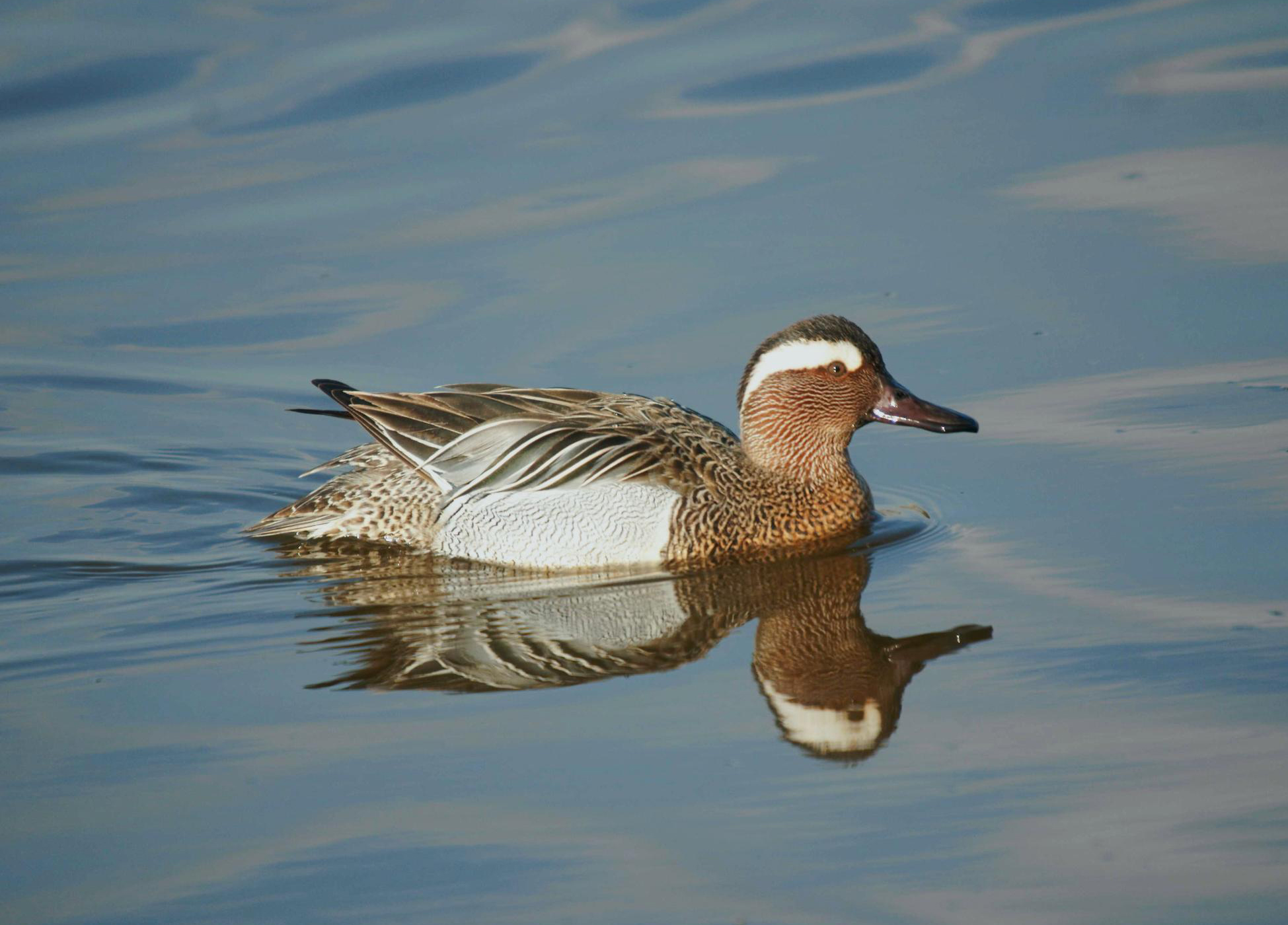 Cerceta carretona / Xarrasclet / Garganey Anas querquedula, male. Llobregat Delta, Barcelona, Spain.